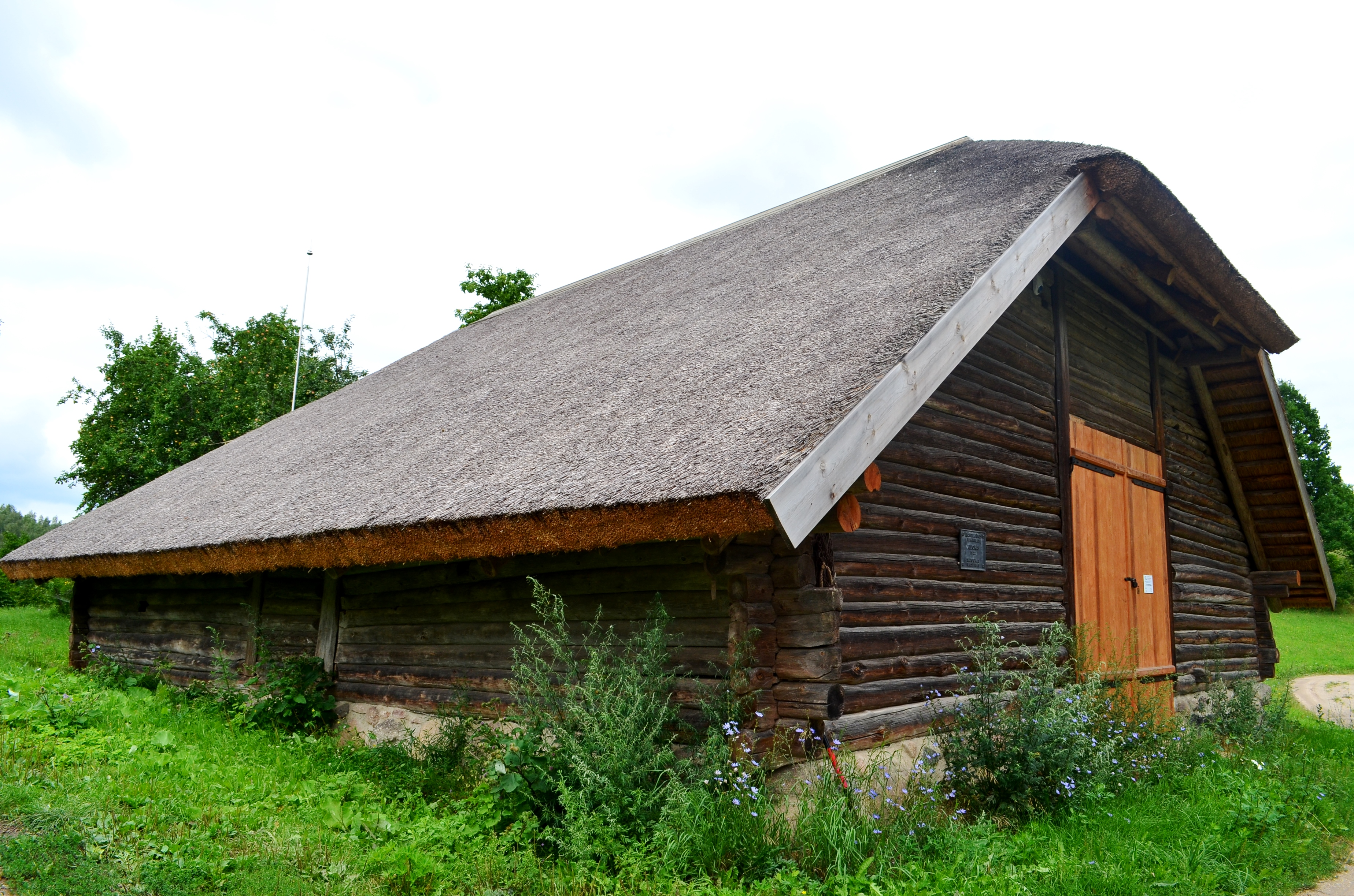 Kluonas, Salų (II) k., Ignalinos raj.